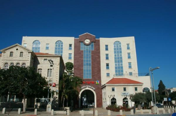 קניון